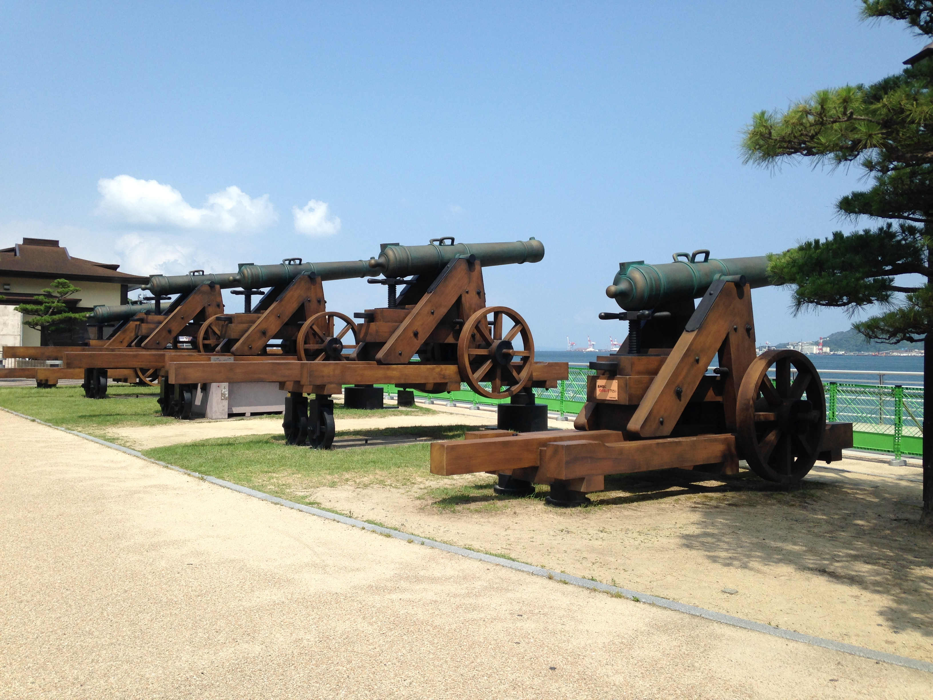 みもすそ川公園の長州砲